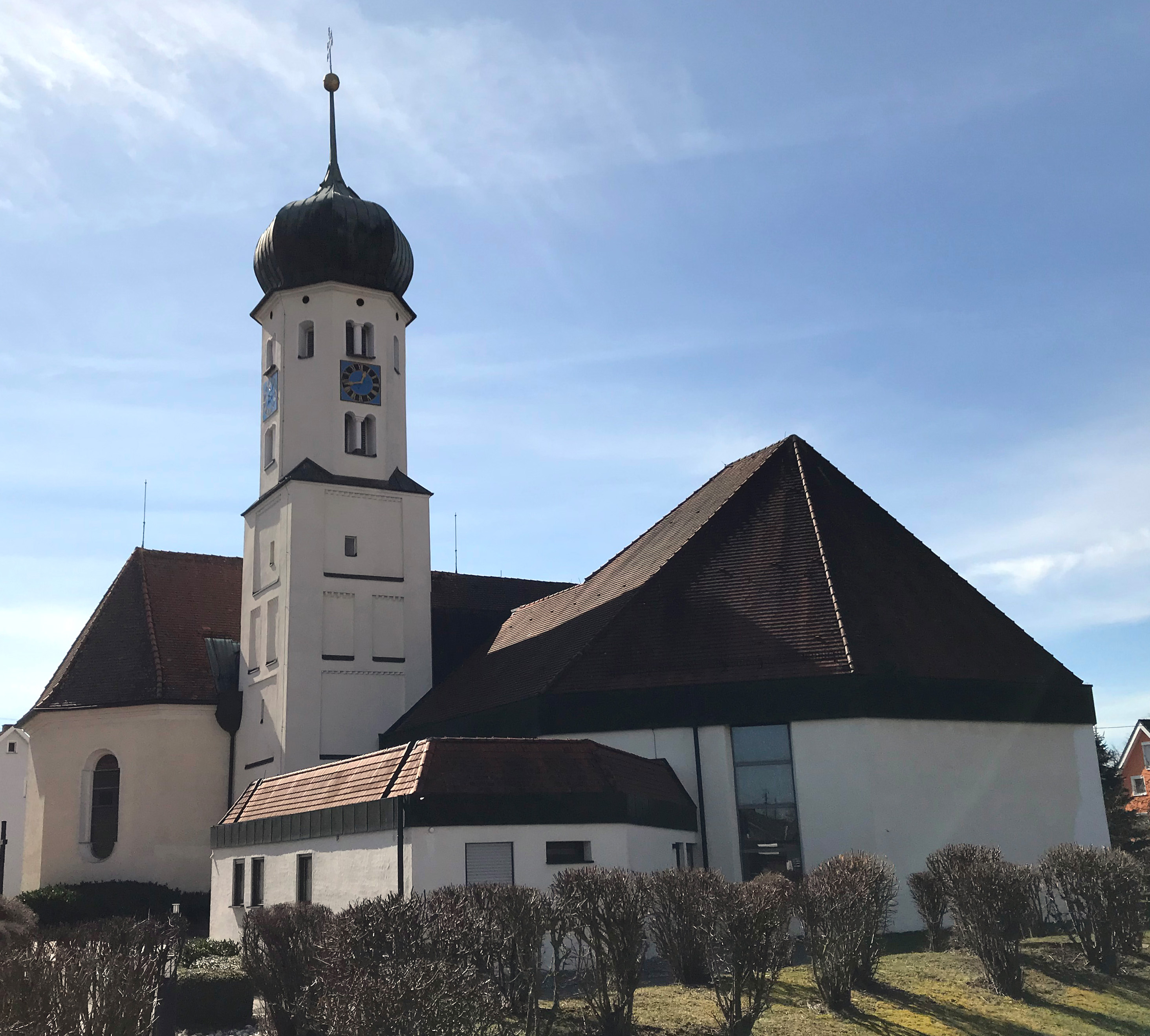 Mariä Unbefleckte Empfängnis in Ebnat (Aalen), erbaut: 1721 bis 1725 und 1979 bis 1981)